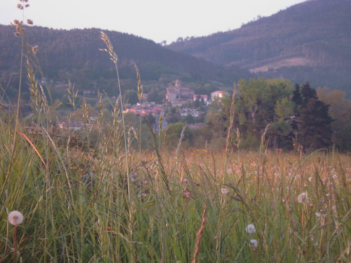 Jatabe bajo las faldas del monte "Jata"